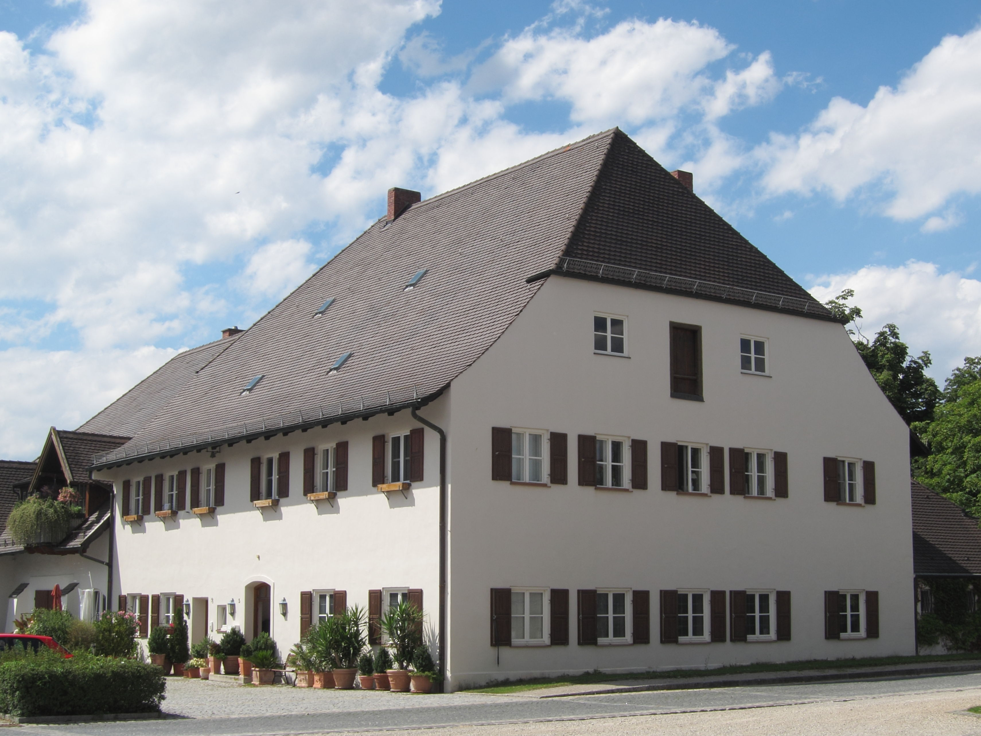 Möschenfeld 5, Gutshof Möschenfeld, Hauptverwaltung, zweigeschossiger Putzbau mit Halbwalmdach, 18. Jahrhundert.